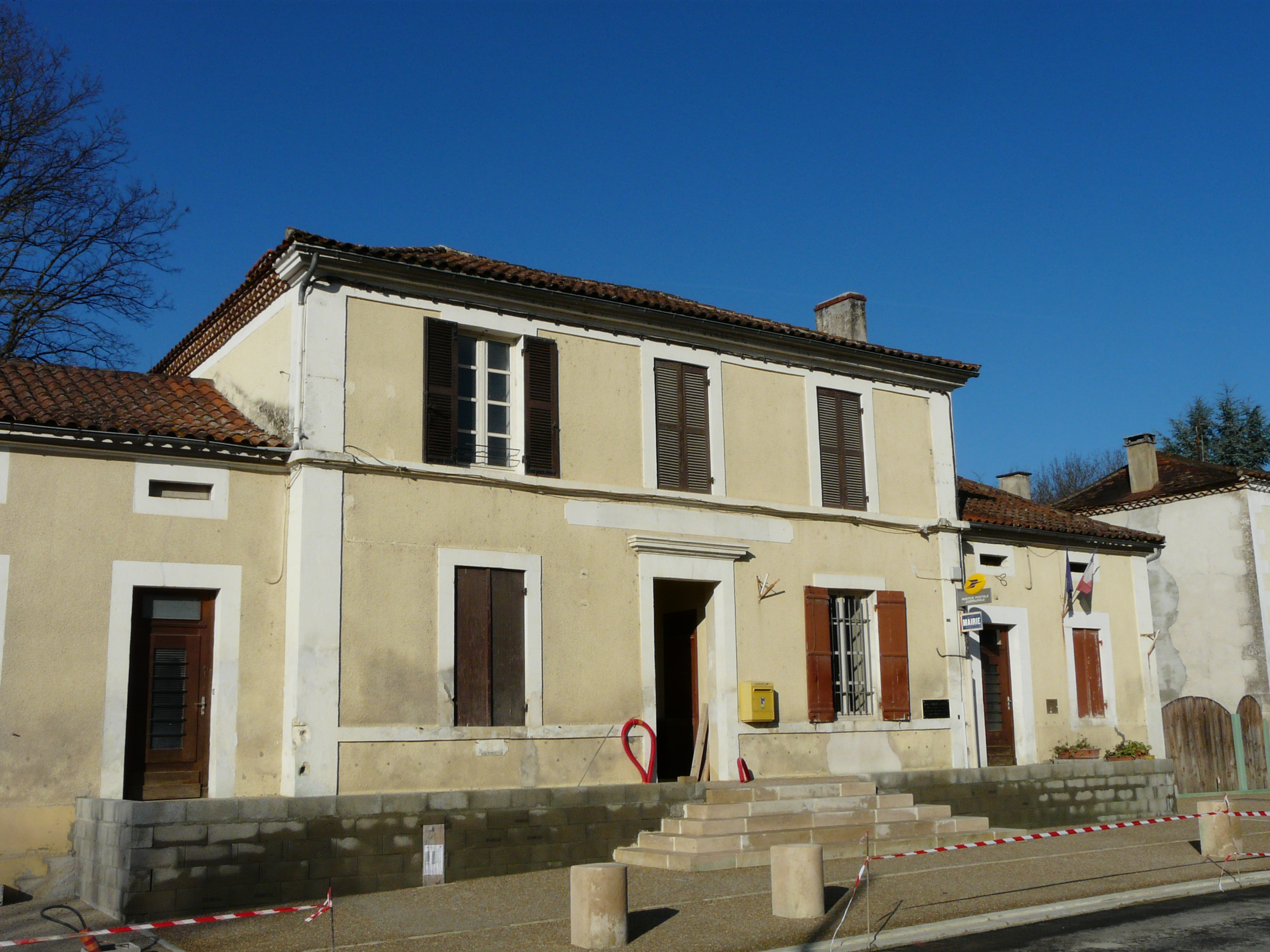 L'agence postale et la mairie de Manzac-sur-Vern, Dordogne, France.